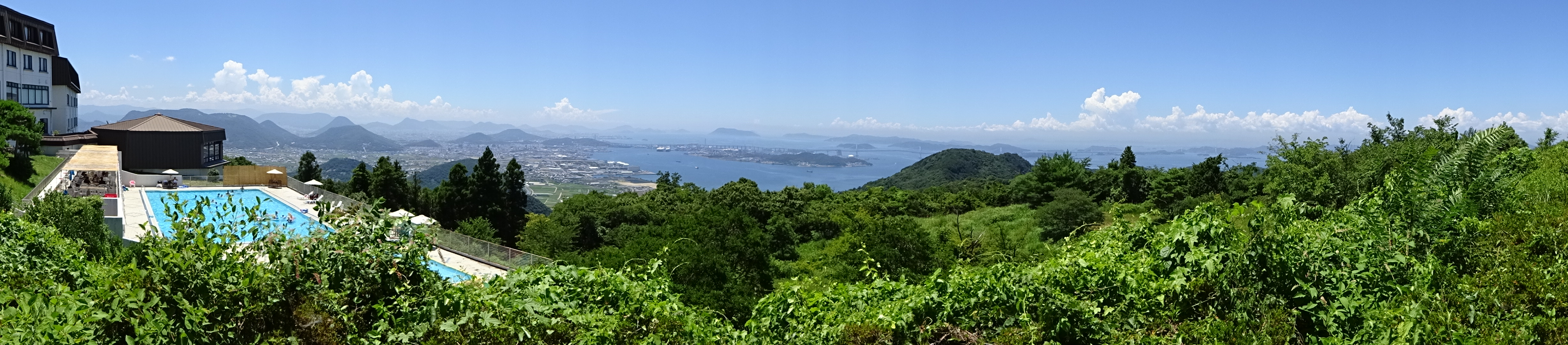 休暇村「讃岐五色台」で讃岐の山々と瀬戸大橋を望む（パノラマ）。七月下旬